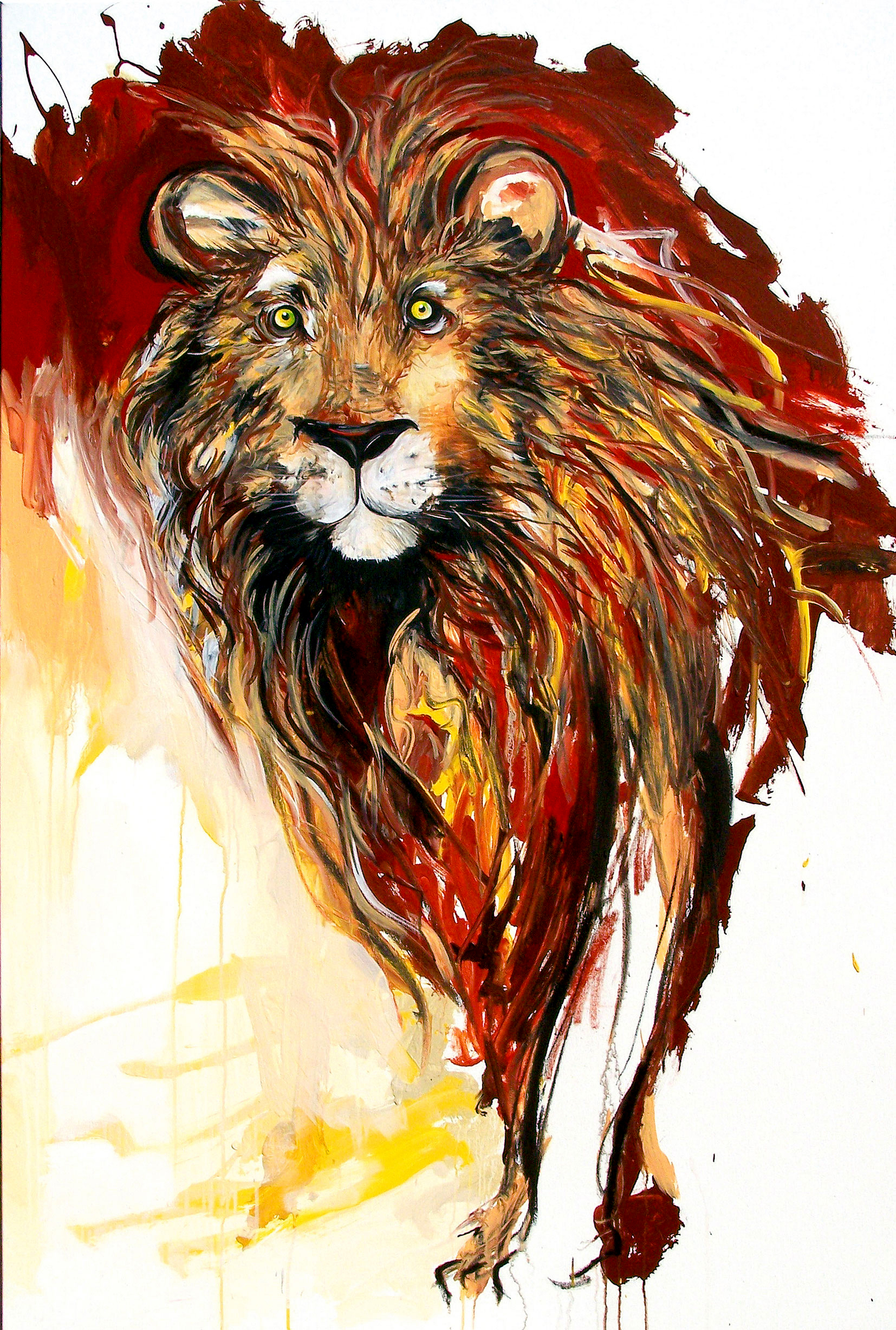 Instant Karma